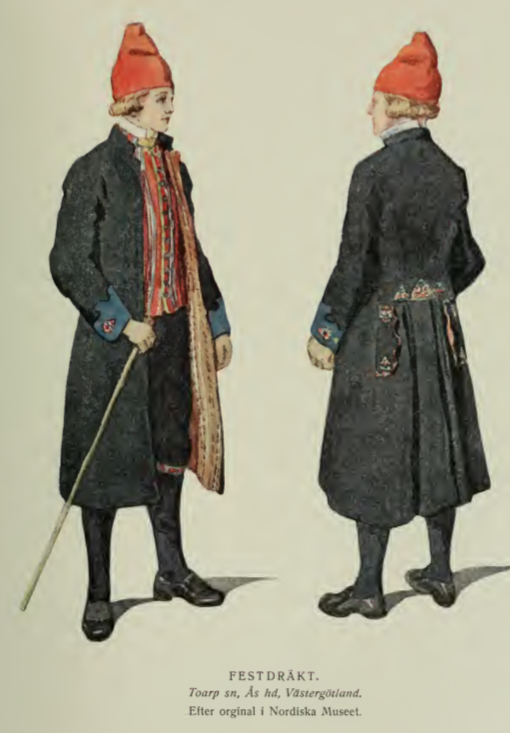 Man i folkdräkt från Toarp socken.